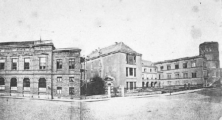 Altes Schloss in Düsseldorf im Jahre 1869, wiederaufgebaut als Versammlungshaus der rheinischen Stände. Ständehaus (links) Galeriegebäude (Mitte) und Schloßturm (rechts).jpg